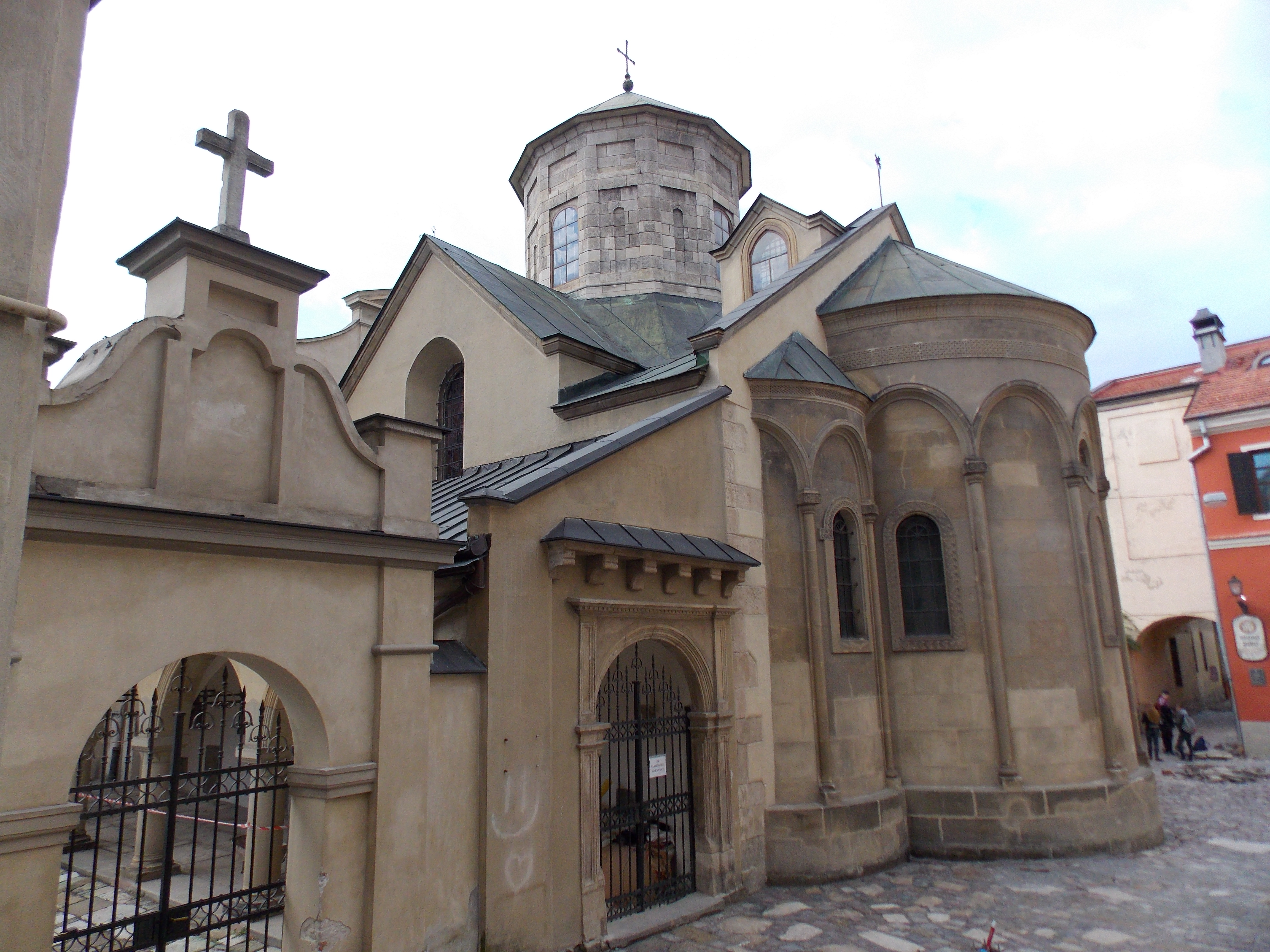 Вірменський собор св. Трійці, Львів, Вірменська, 7